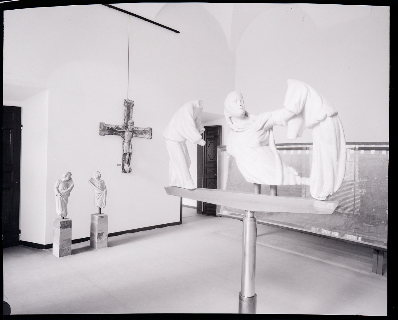 Genova. Galleria di Palazzo Bianco. Sala con "Monumento funebre a Margherita di Brabante" di Giovanni Pisano, oggi conservato al Museo di Sant'Agostino, Angelo reggi cortina e Crocifisso francese. Servizio fotografico : Genova, 1965 / Paolo Monti. - Buste: 3, Fototipi: 3 : Negativo b/n, gelatina bromuro d'argento/ pellicola ; 10x12. - ((Serie costituita da 3 buste sciolte di negativi identificati con i nn.: 10549, 10550, 10550bis. - Oggi conservati al Museo di Sant'Agostino, Genova. - Occasione: Documentazione della Galleria di Palazzo Bianco. - Fonte: Agenda di Paolo Monti: Monti/ 2/ 6 giugno 1964 - 31 marzo 1966/ 8194-12420 (1964-1966), presso Archivio Paolo Monti